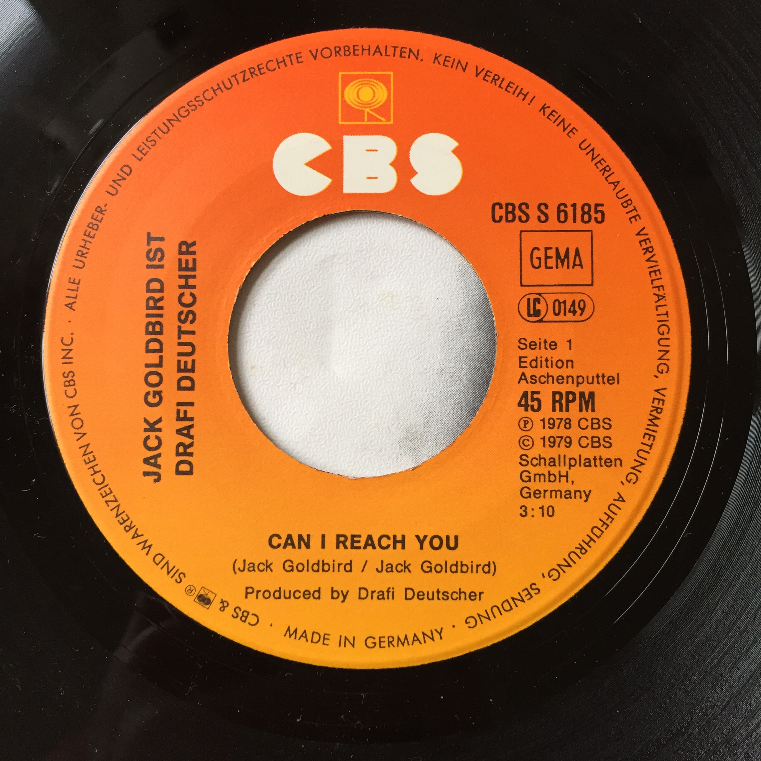 Label Single "Can I reach you" Jack Goldbird alias Drafi Deutscher